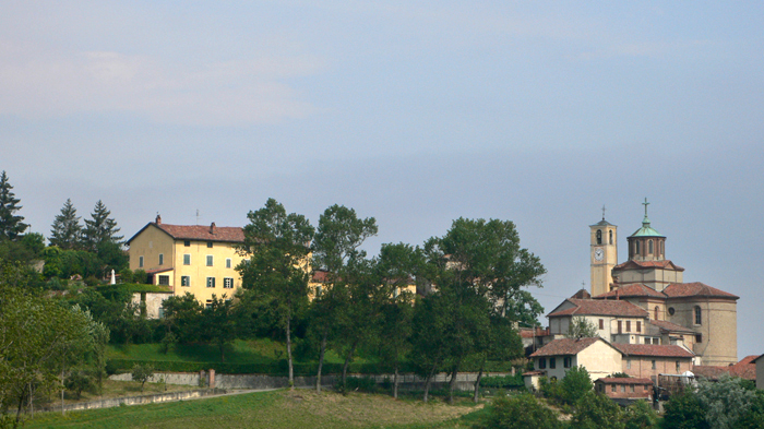 autore: paolo ferraguti "veduta di Belvedere Langhe"